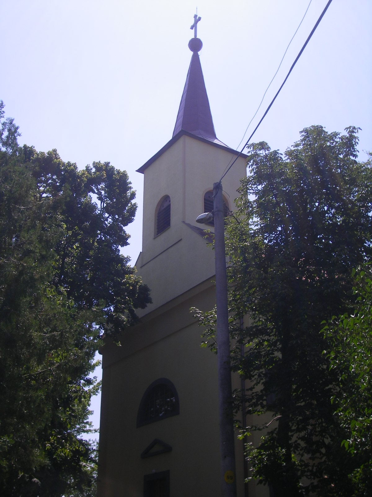 Ipolyság/Pereszlény - katolikus templom